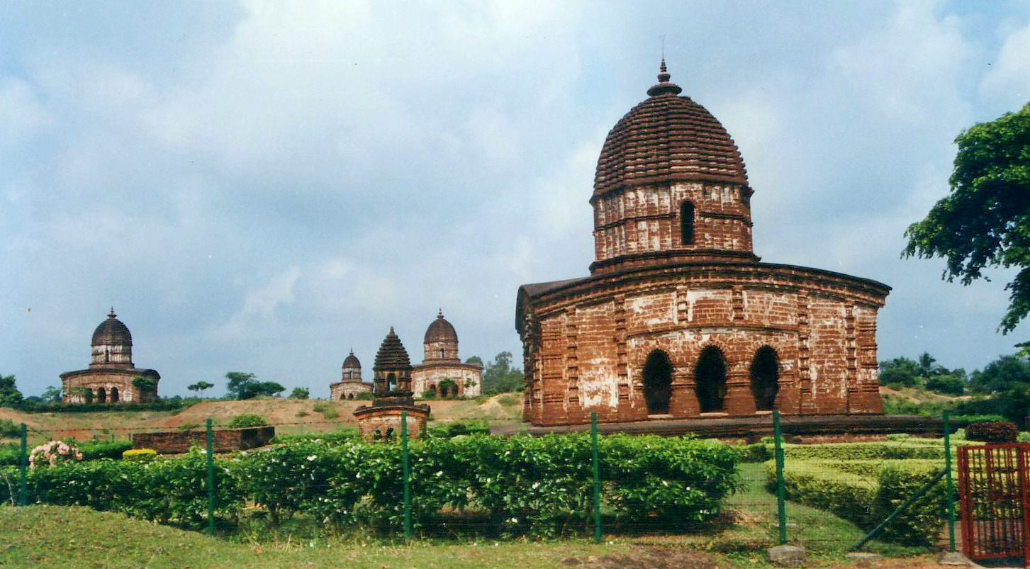 Bishnupur (West Bengal) - Templi di terracotta